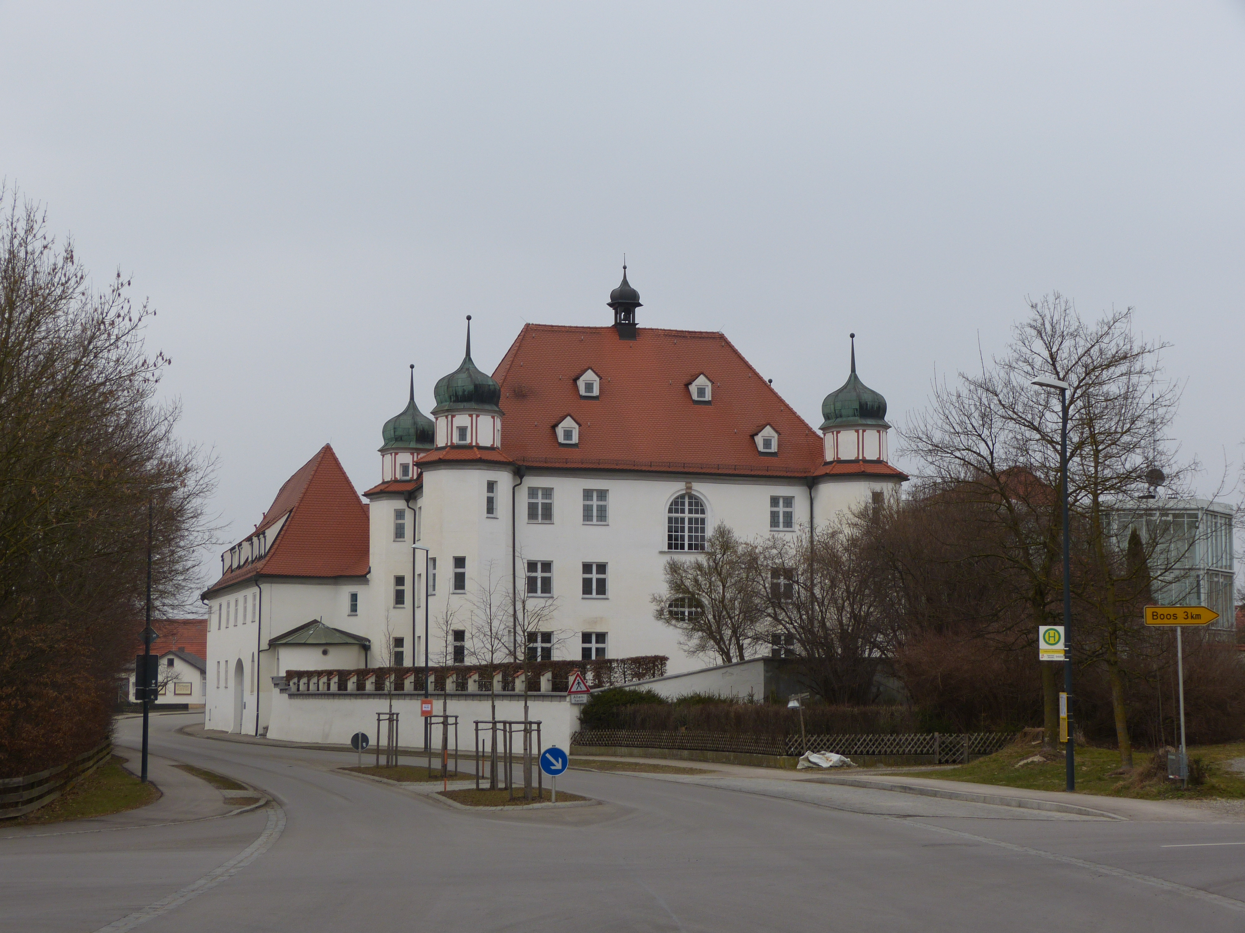 Schloss, Fellheim, Landkreis Unterallgäu, Bayern